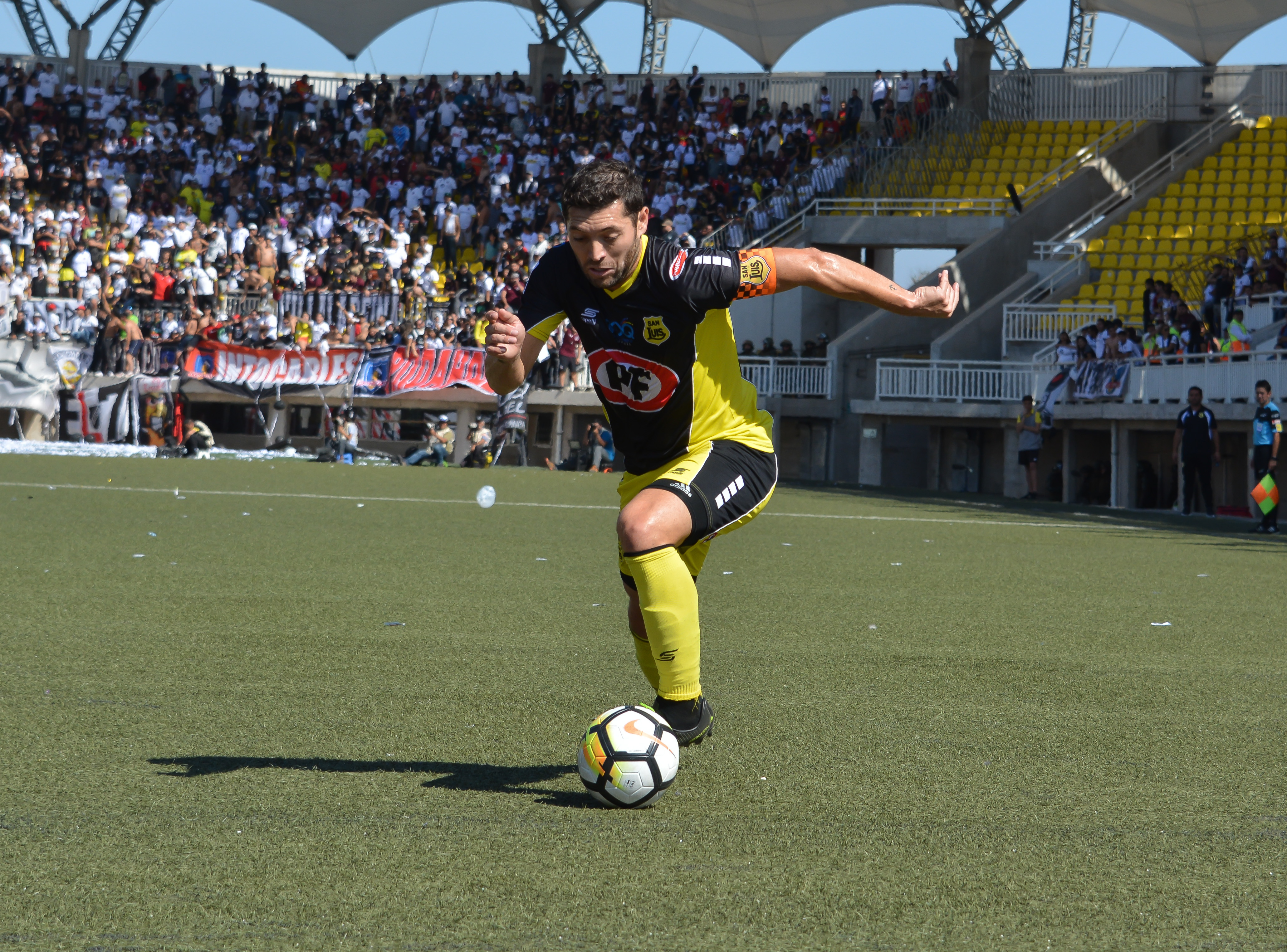 San Luis v Colo-Colo, Estadio Municipal Lucio Fariña Fernández, Quillota, Chile.